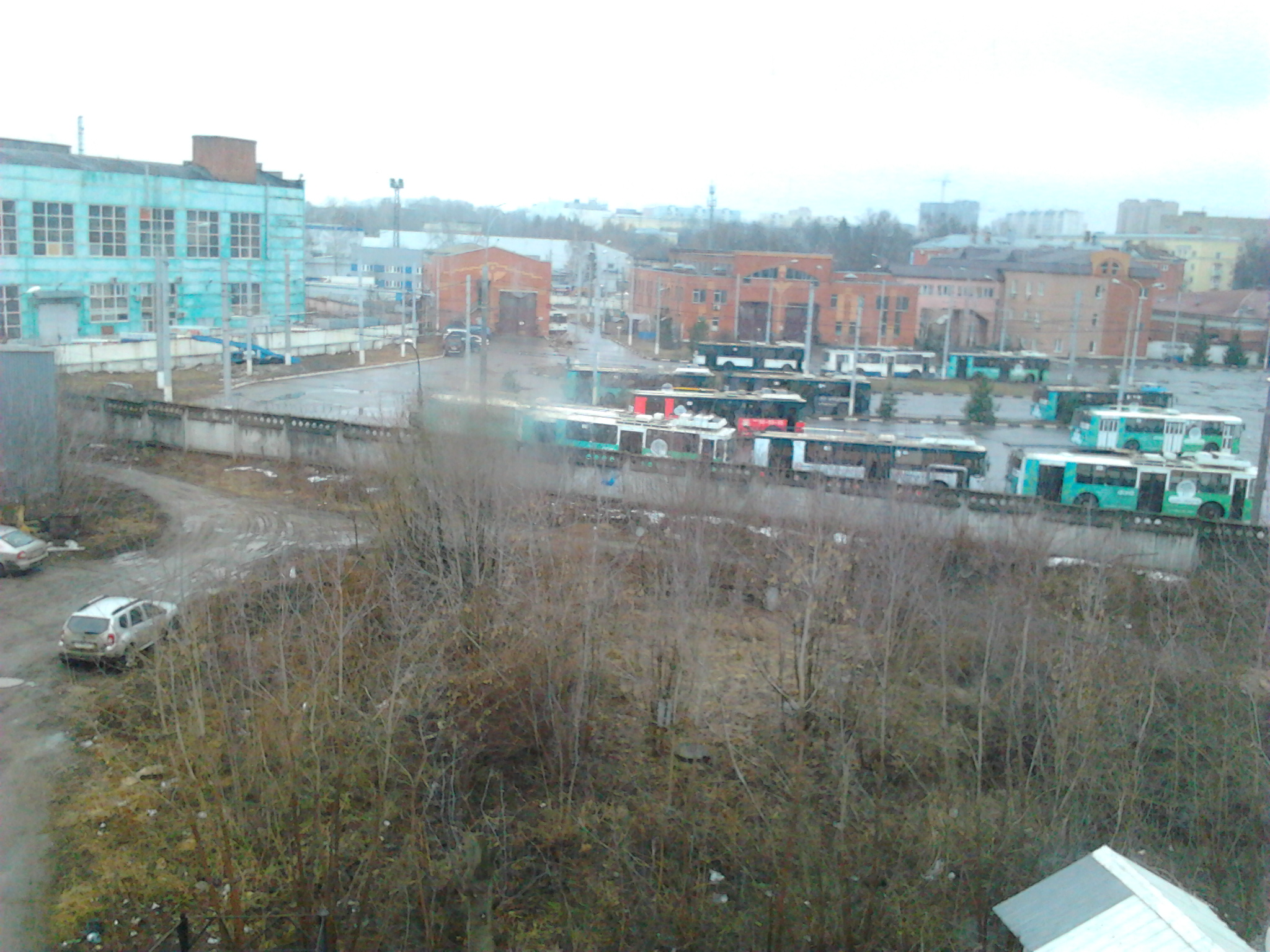 МУП Подольский троллейбус